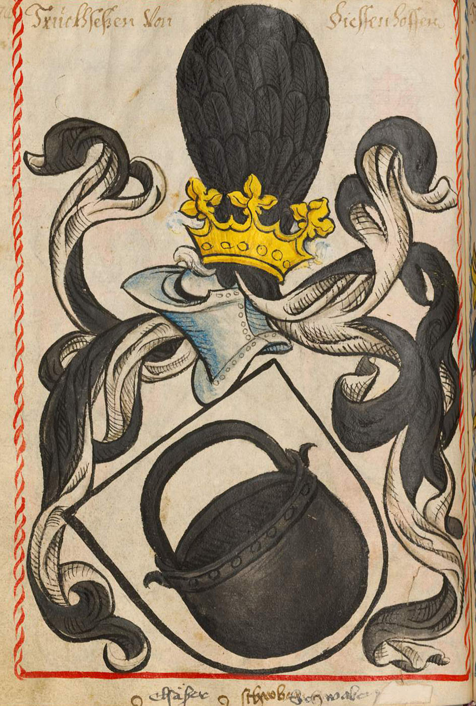 Scheibler'sches Wappenbuch, älterer Teil; Seite 78 Truckhseßen von Diessenhoffen (Truchsess von Diessenhofen) Schwaben